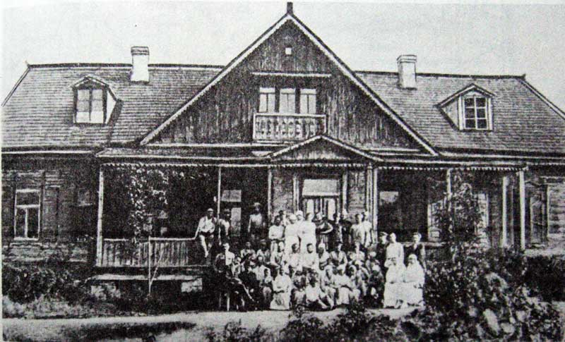 Беларуская (тарашкевіца): Менск (Miensk), Навінкі (Navinki). Філія 2-й губэрнскай лякарні